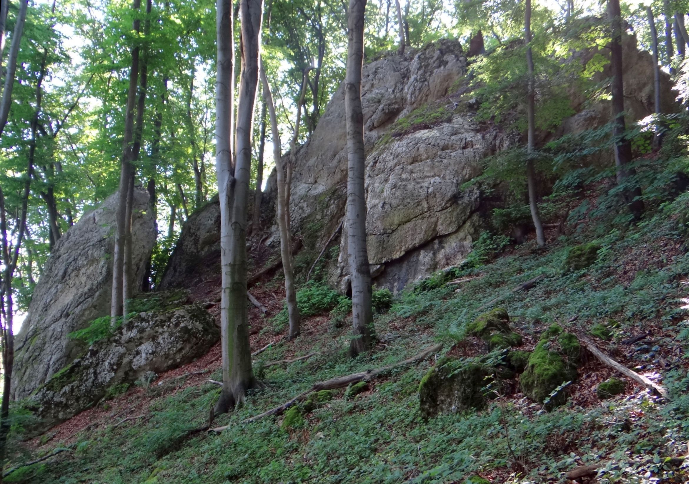 Plaskulaw Lesie Zabierzowskim w Kochanowie